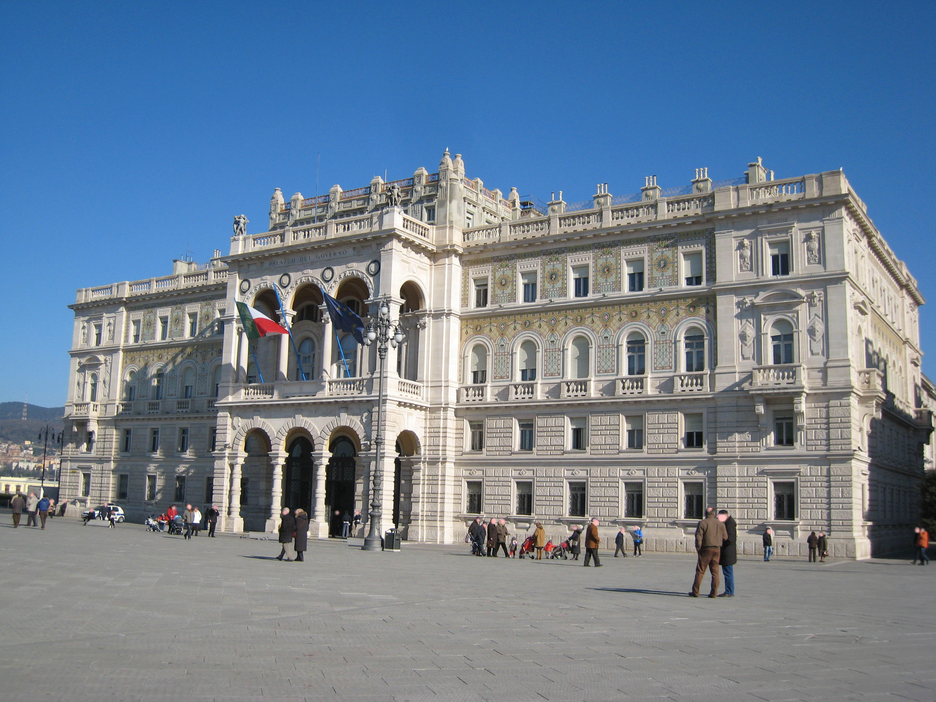 La prefettura in piazza Unità a Trieste. Febbraio 2008